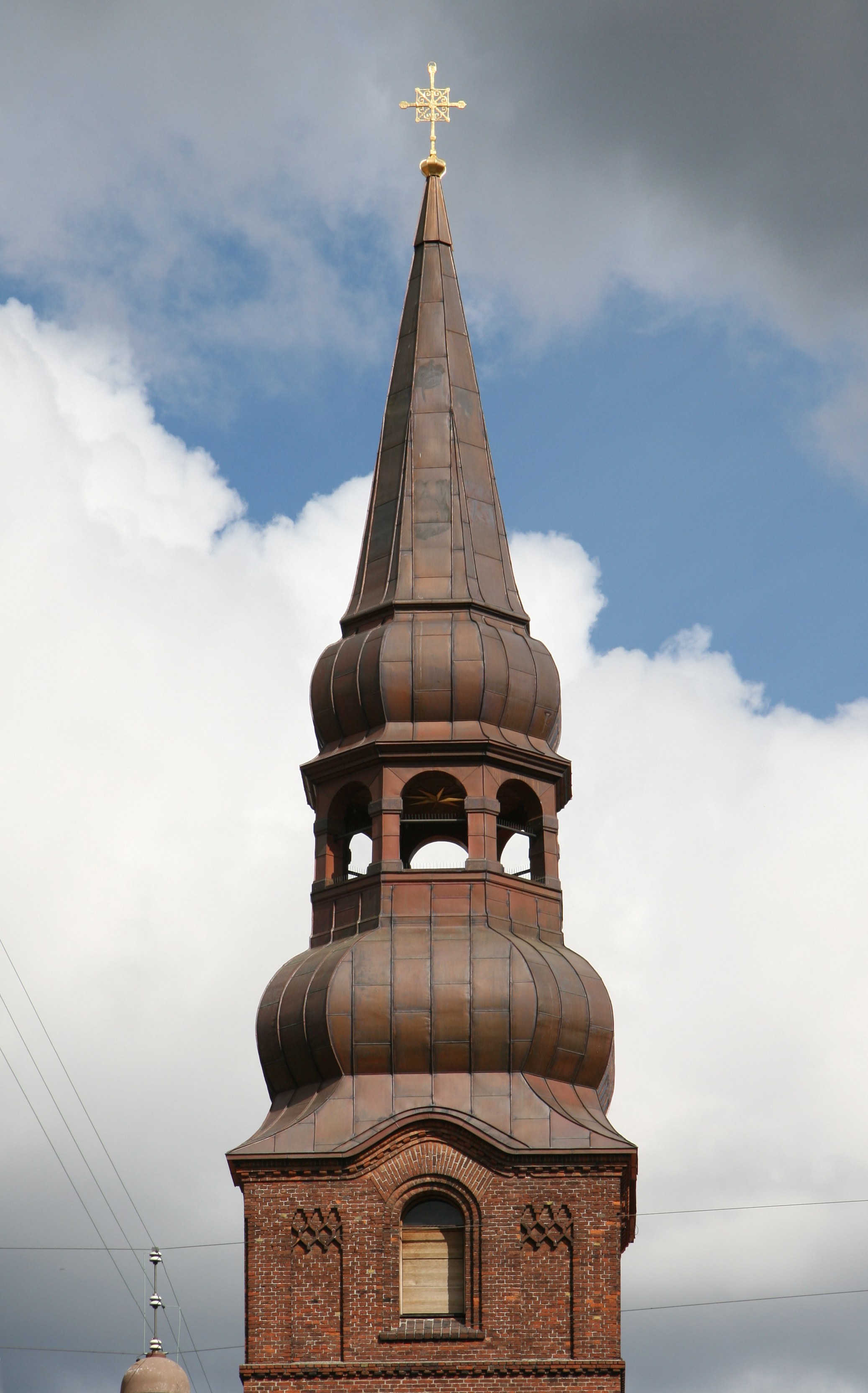 Simeons Kirke, Copenhagen, Denmark. Steeple